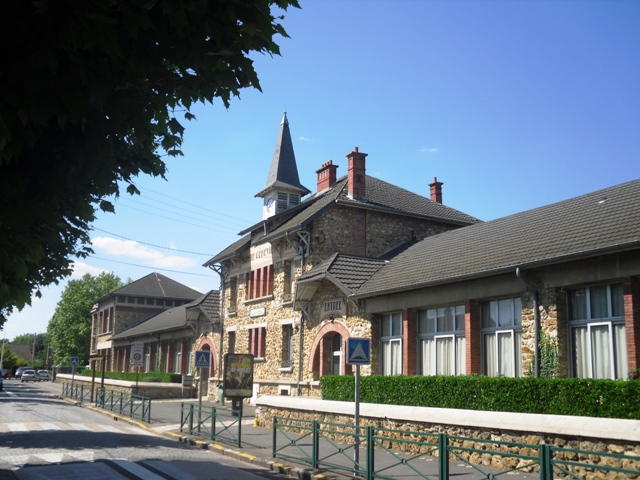 L'école élémentaire Hippolyte Cocheris de Sainte-Geneviève-des-Bois (91)